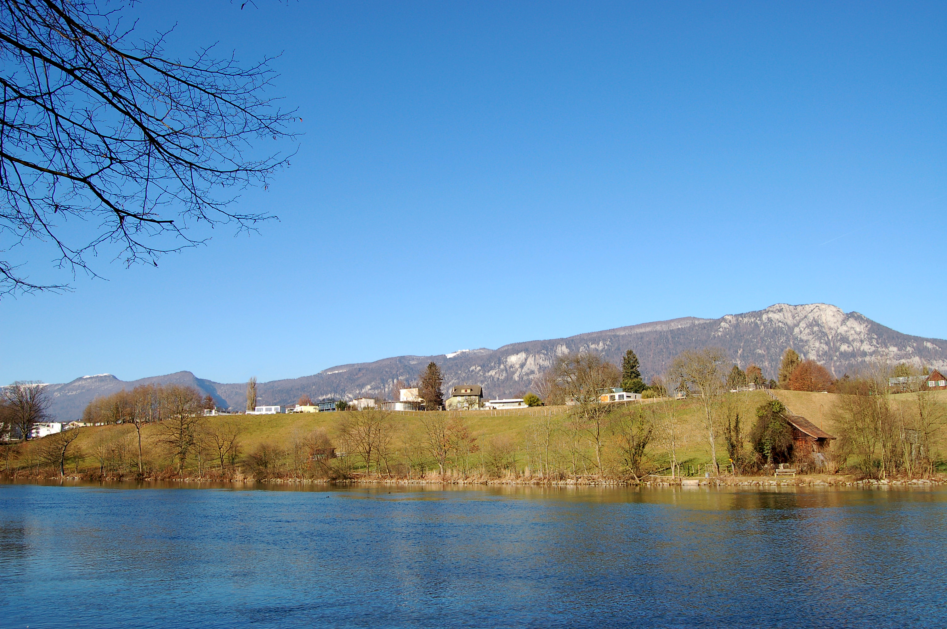 Feldbrunnen aus Sportzentrum Zuchwil gesehen